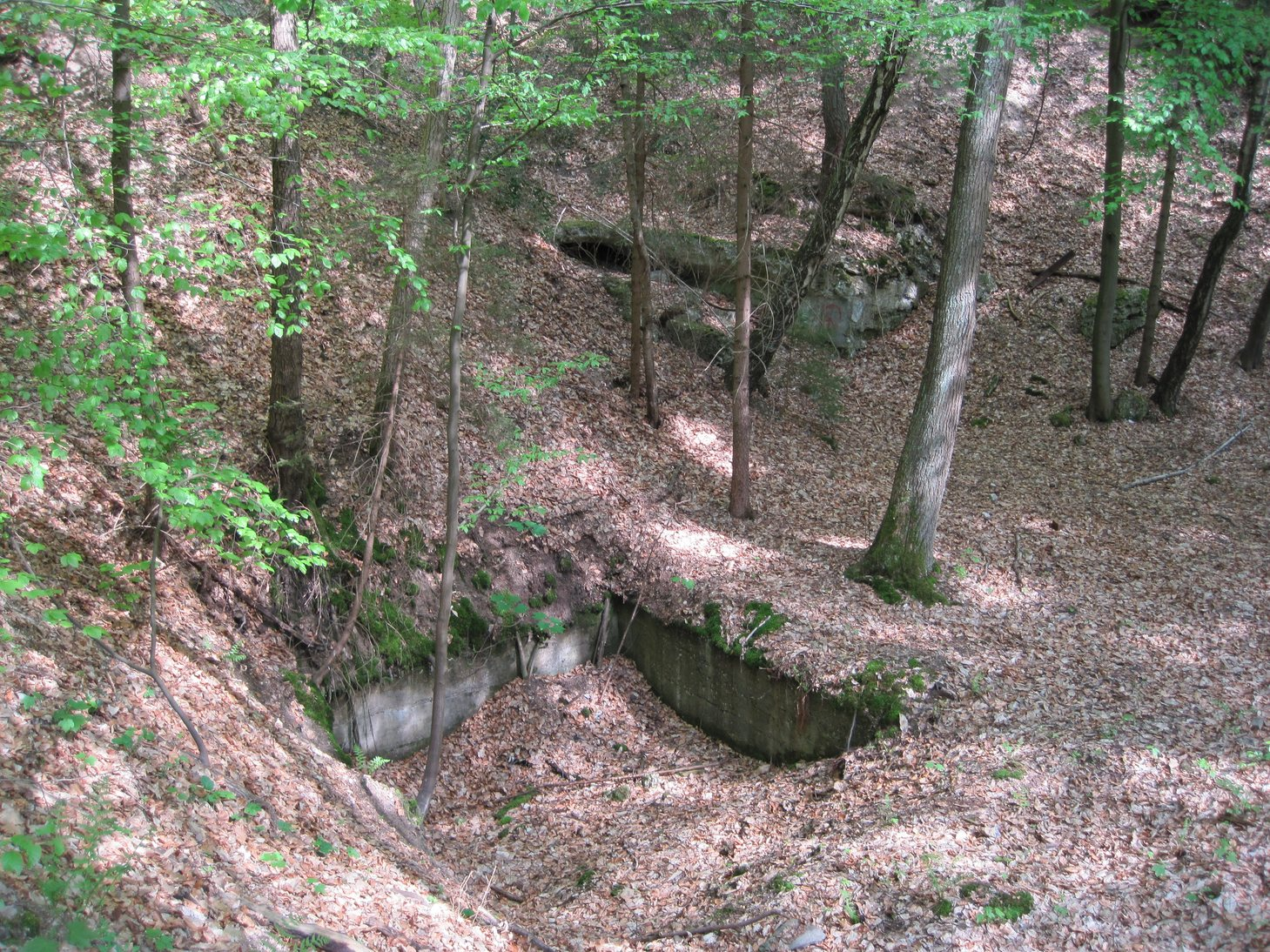 Stollensystem Ofenkaulen, Siebengebirge Bonn, Schacht 44